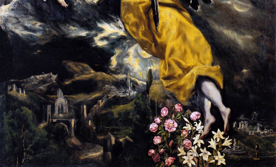 La obra representa la Inmaculada Concepción de la Virgen María.